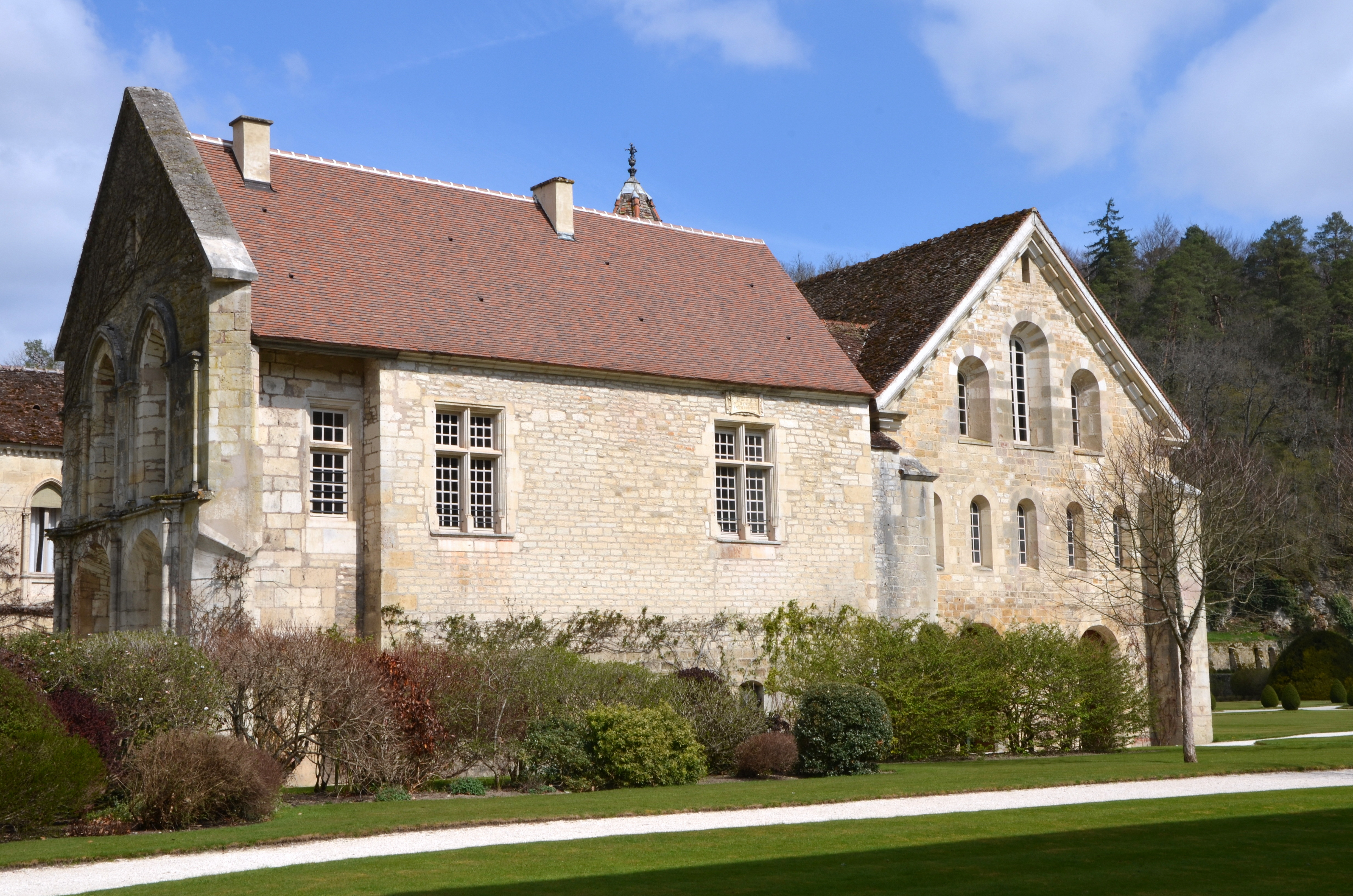 Enfermerie de l'abbaye de Fontenay, Côte d'Or, Bourgogne, France